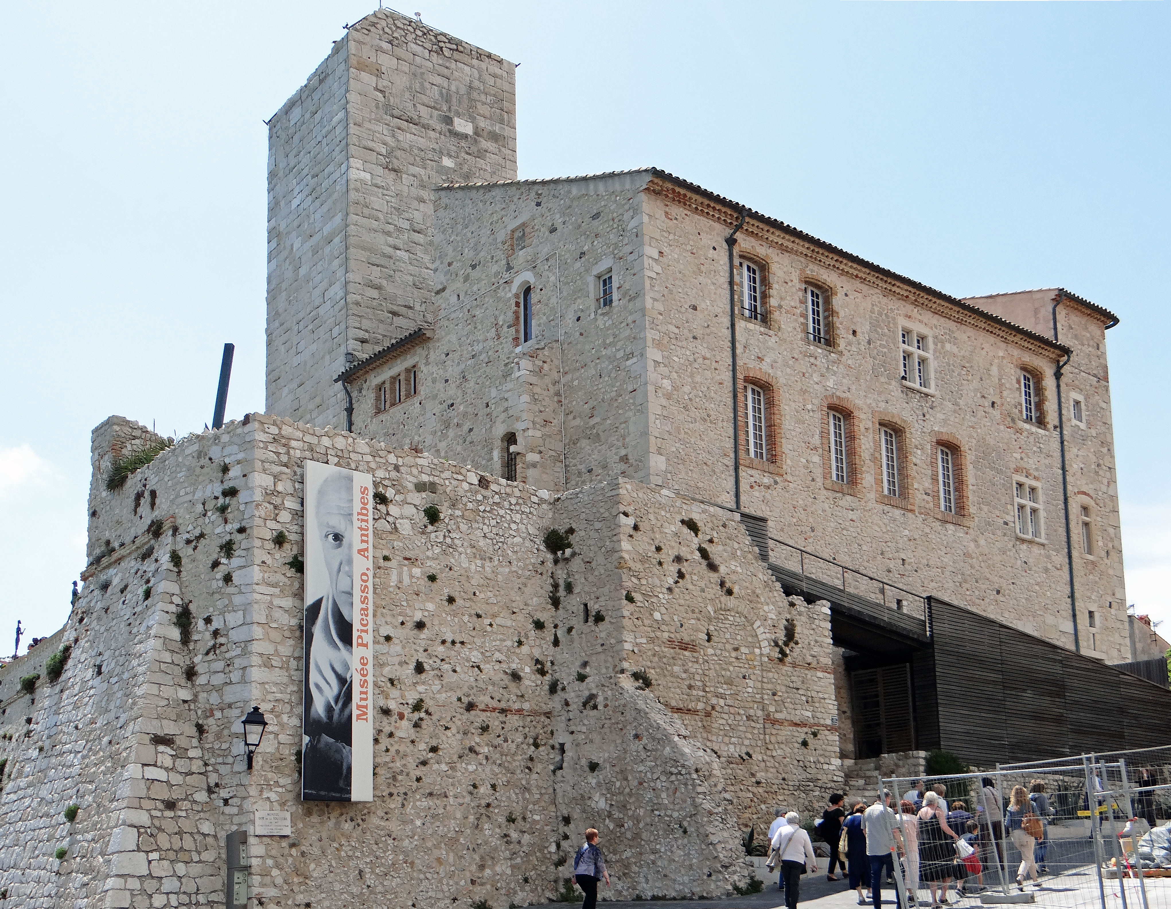 Antibes - Château et musée Picasso - Façade vers l'ancienne cathédrale